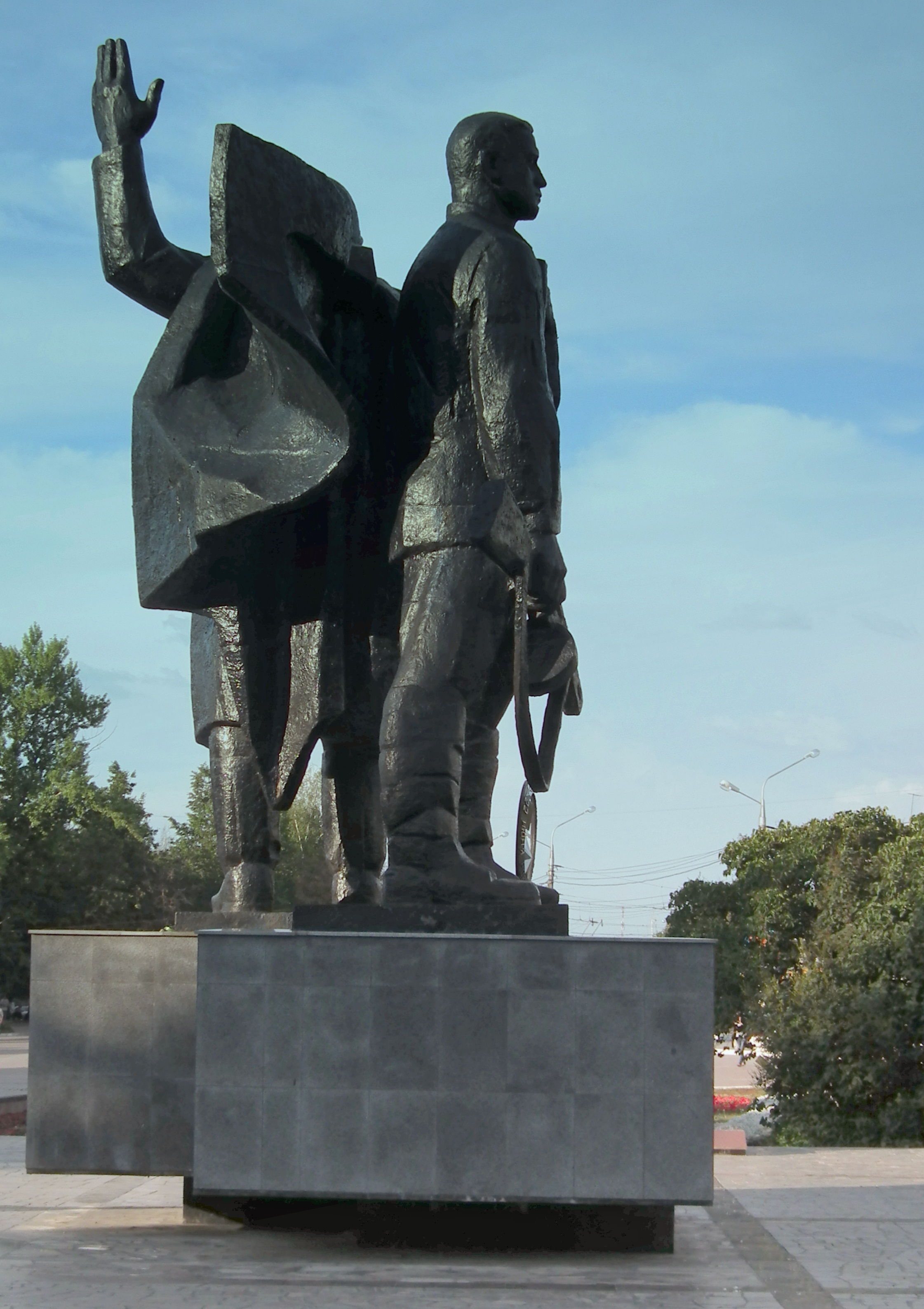 защитникам города-героя Тулы